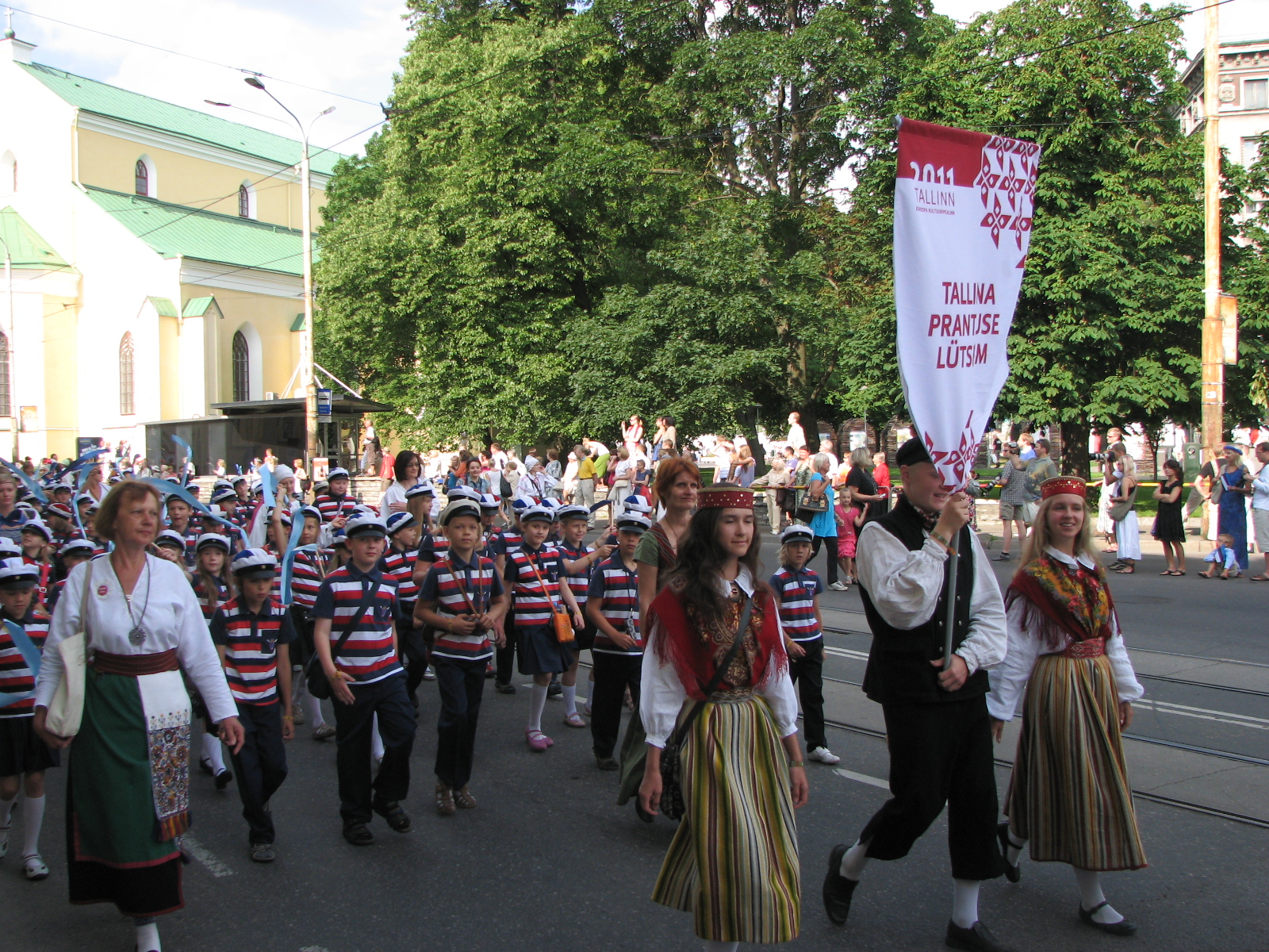 Tallinna Prantsuse Lütseumi esindus XI noorte laulu- ja tantsupeol